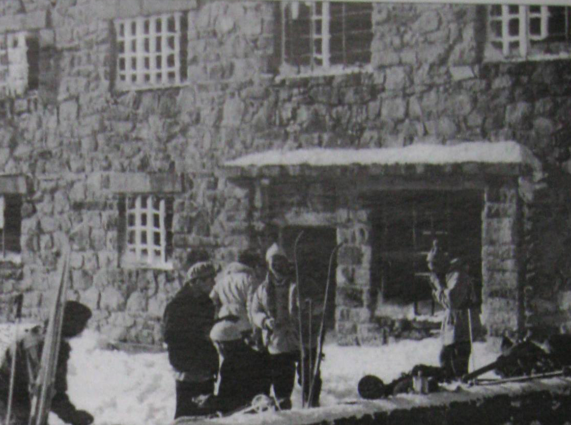 Вигляд головного входу станом на 1956 р.